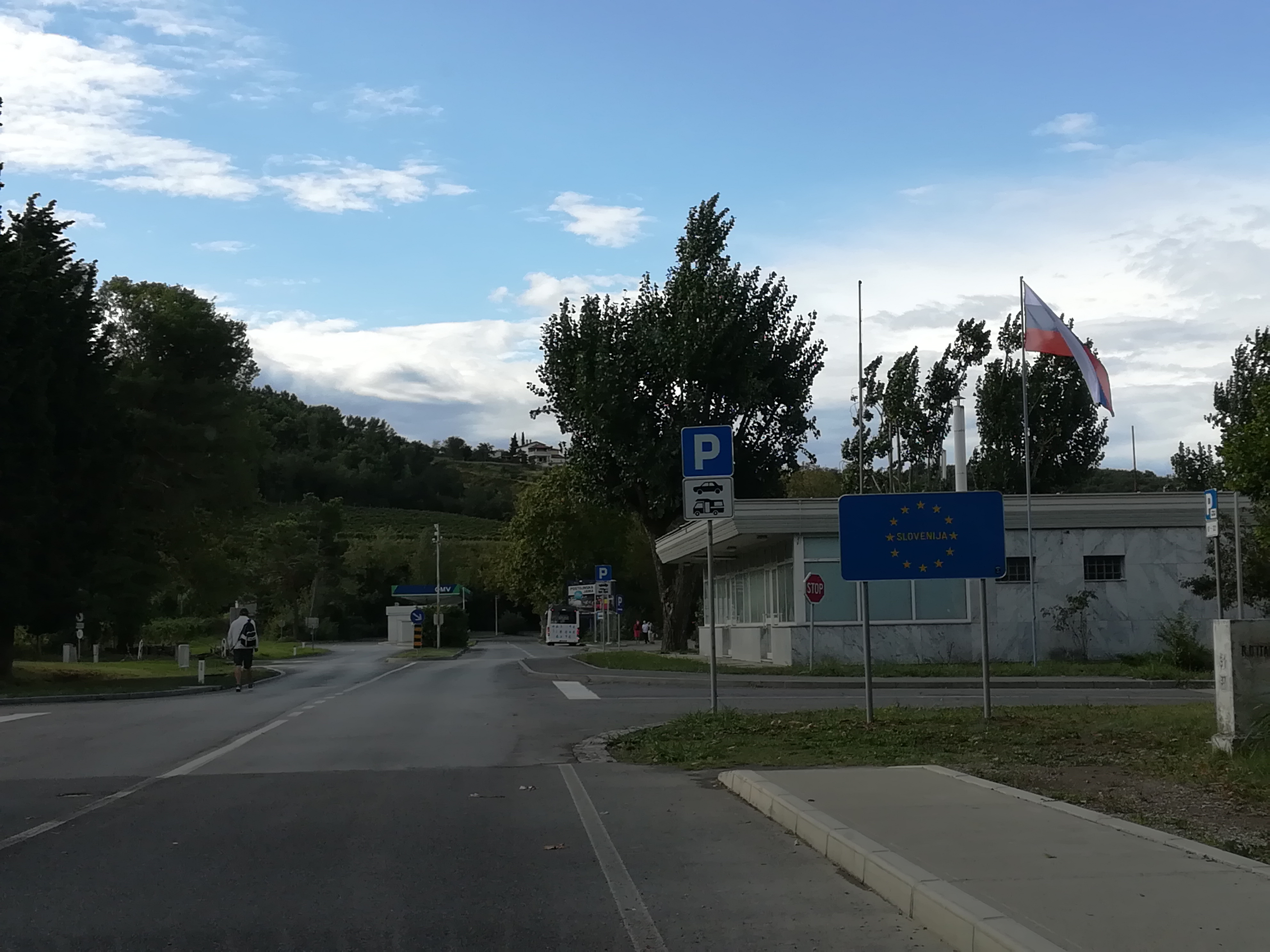 Border of Italy-Slovenia